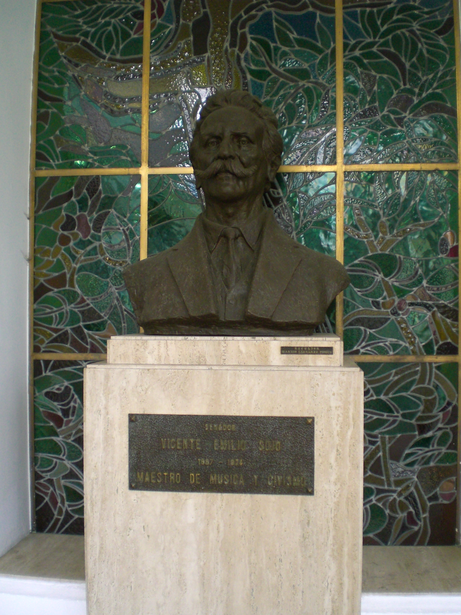 Busto del músico venezolano Vicente Emilio Sojo, Palacio Federal Legislativo, Caracas.